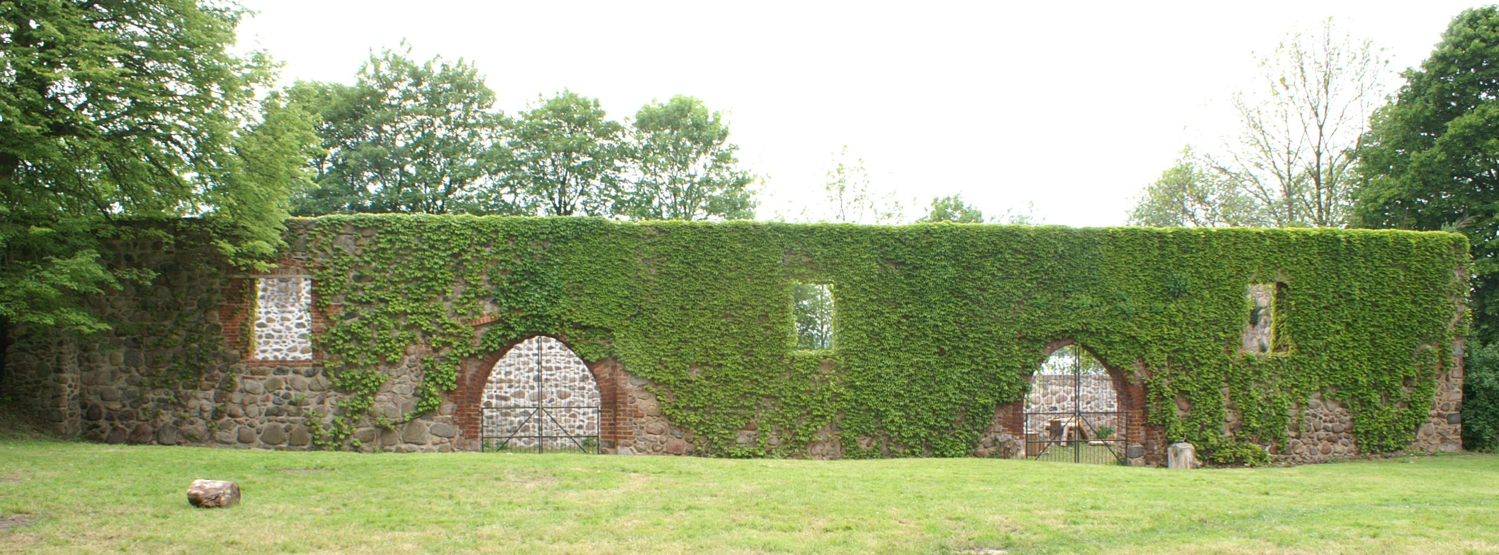 Klein Nemerow - Ruine der Klosterscheune der ehemaligen Komturei